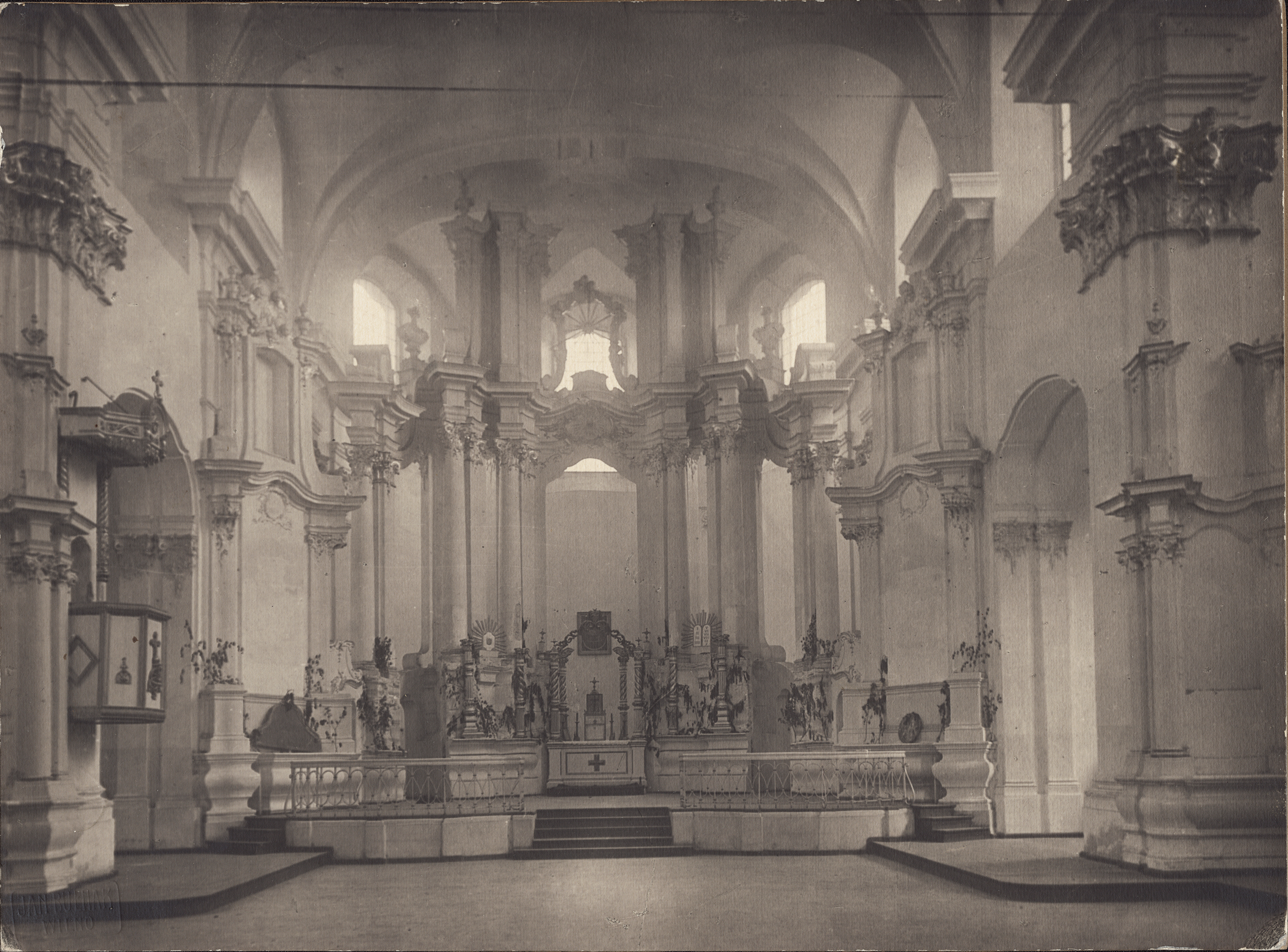 Інтэр'ер. Здымак Я. Булгака 1930-х гг.